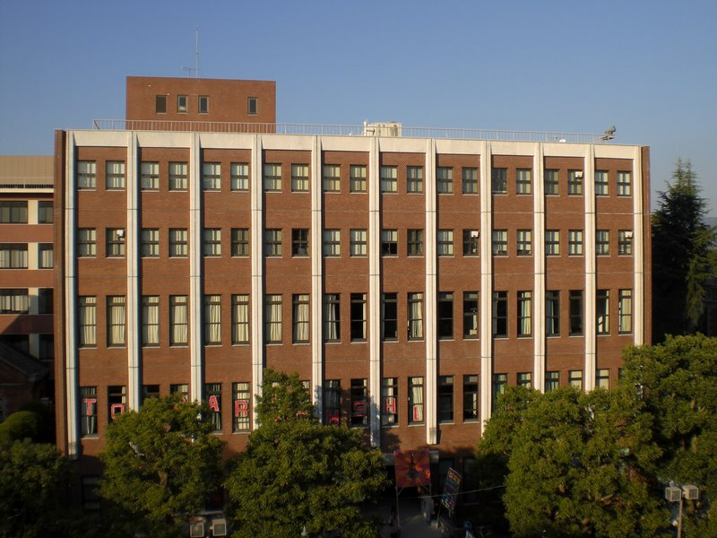 同志社大学至誠館